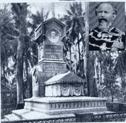 Portretje van kolonel Pel